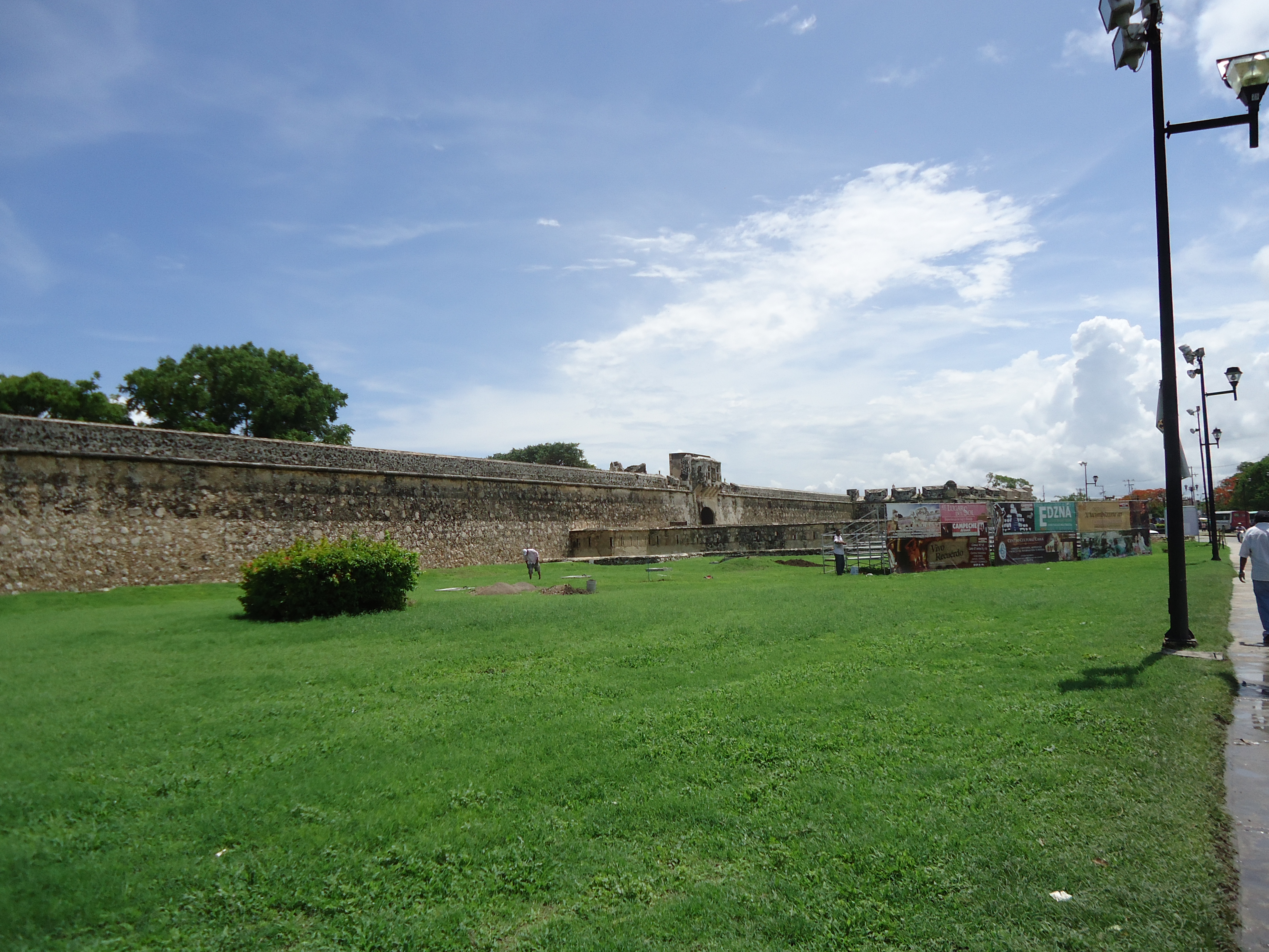 Imagen de las murallas de campeche